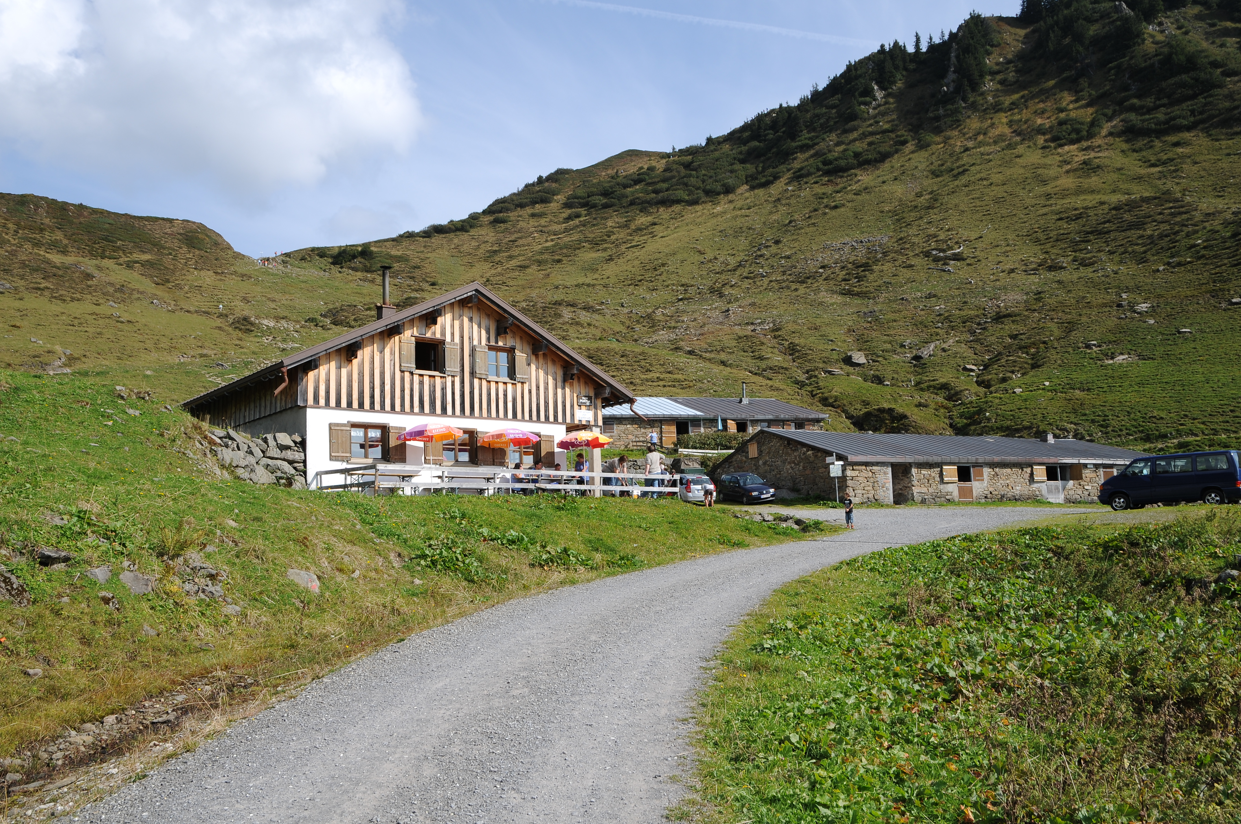 Die Portla Alpe liegt im Gemeindegebiet von Damüls.